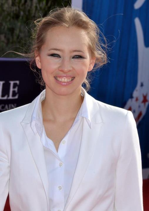 Isild Le Besco au festival du cinéma américain de Deauville